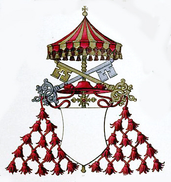 Hugo Gerhard Ströhl: "Heraldischer Atlas". Stuttgart 1899. Tafel 49, Kirchliche Heraldik, Bild 2, Wappen des Kardinal-Camerlengo während der Sedisvakanz (ohne den eigentlichen Wappenschild)